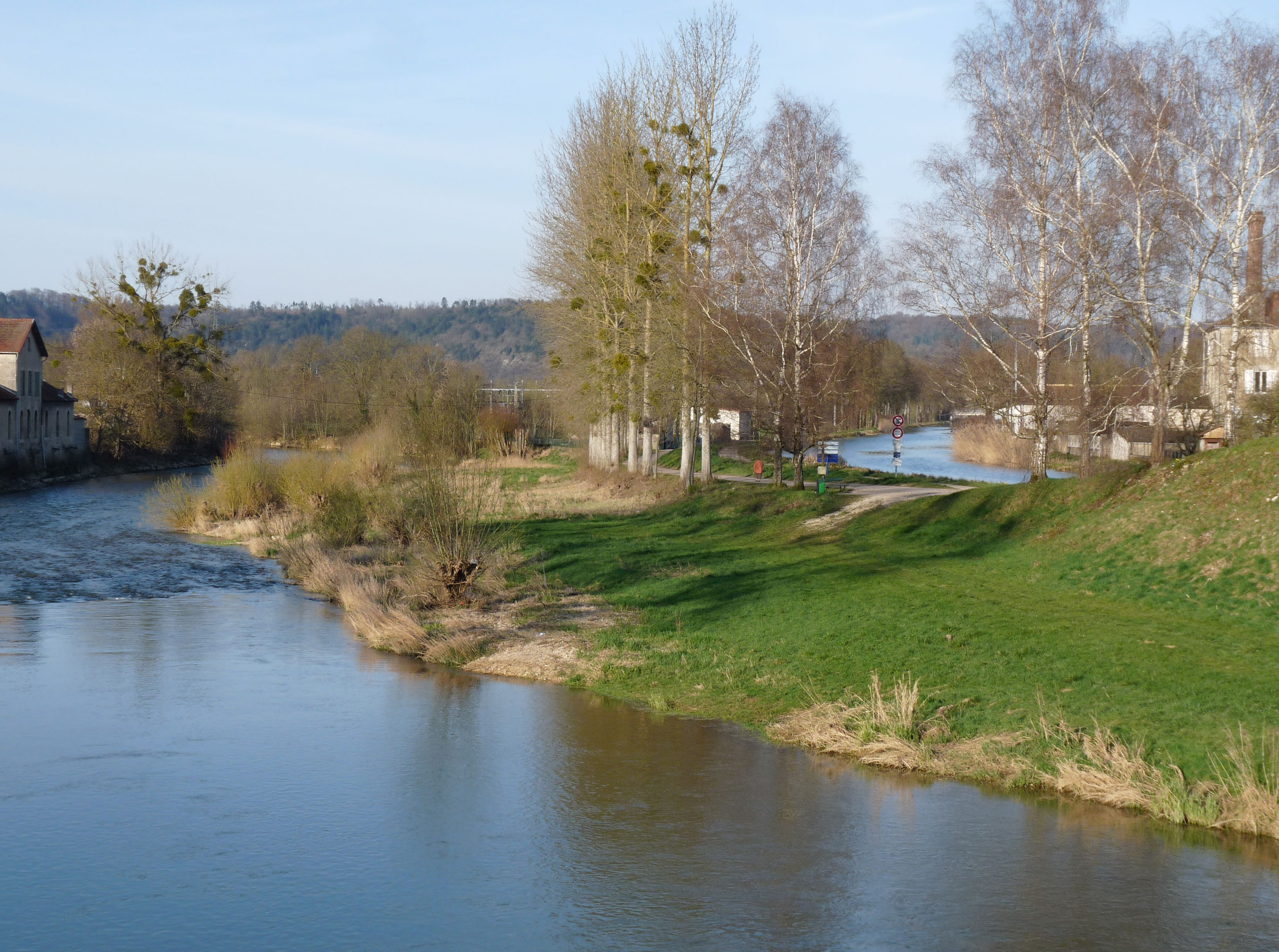 La Marne à Joinville (Haute-Marne). A droite, le Canal de la Marne à la Saône.